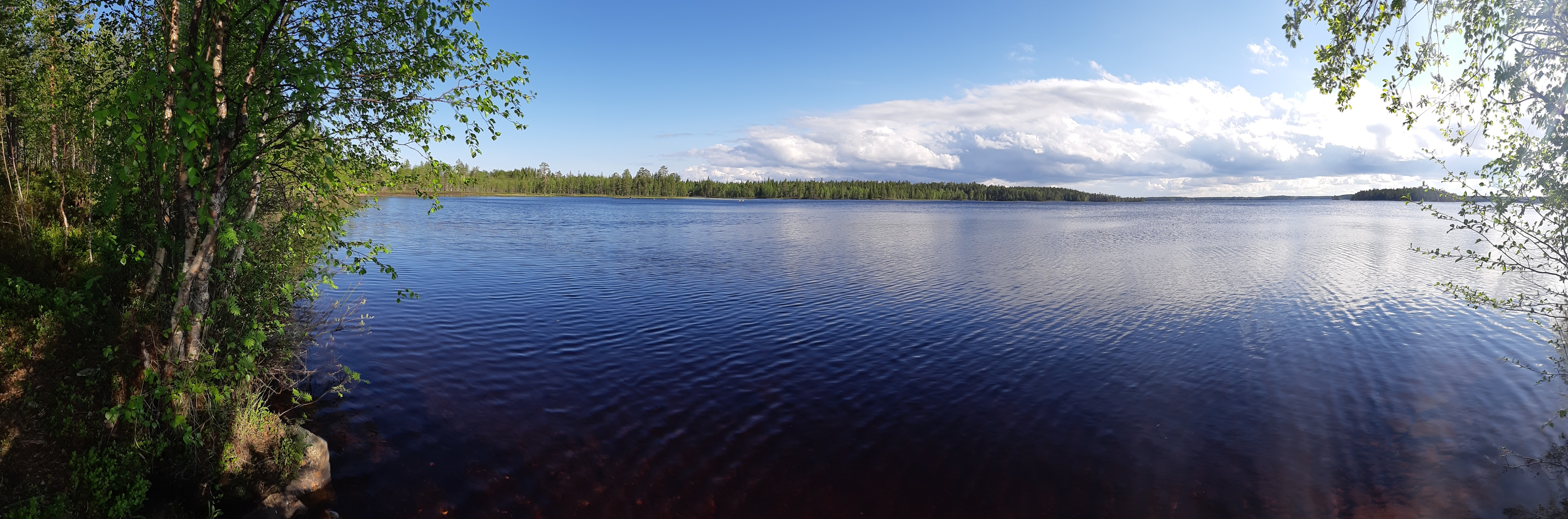 Вангозеро